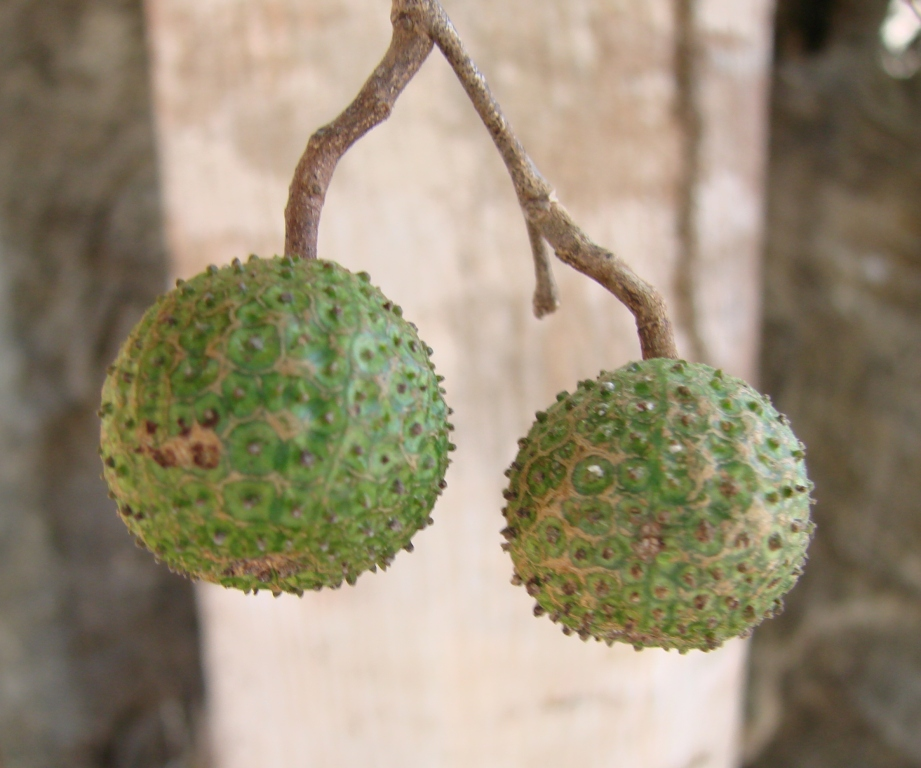 Guazuma ulmifolia - MALVACEAE Parque Estadual Terra Ronca - São Domingos - Goiás - Brasil.